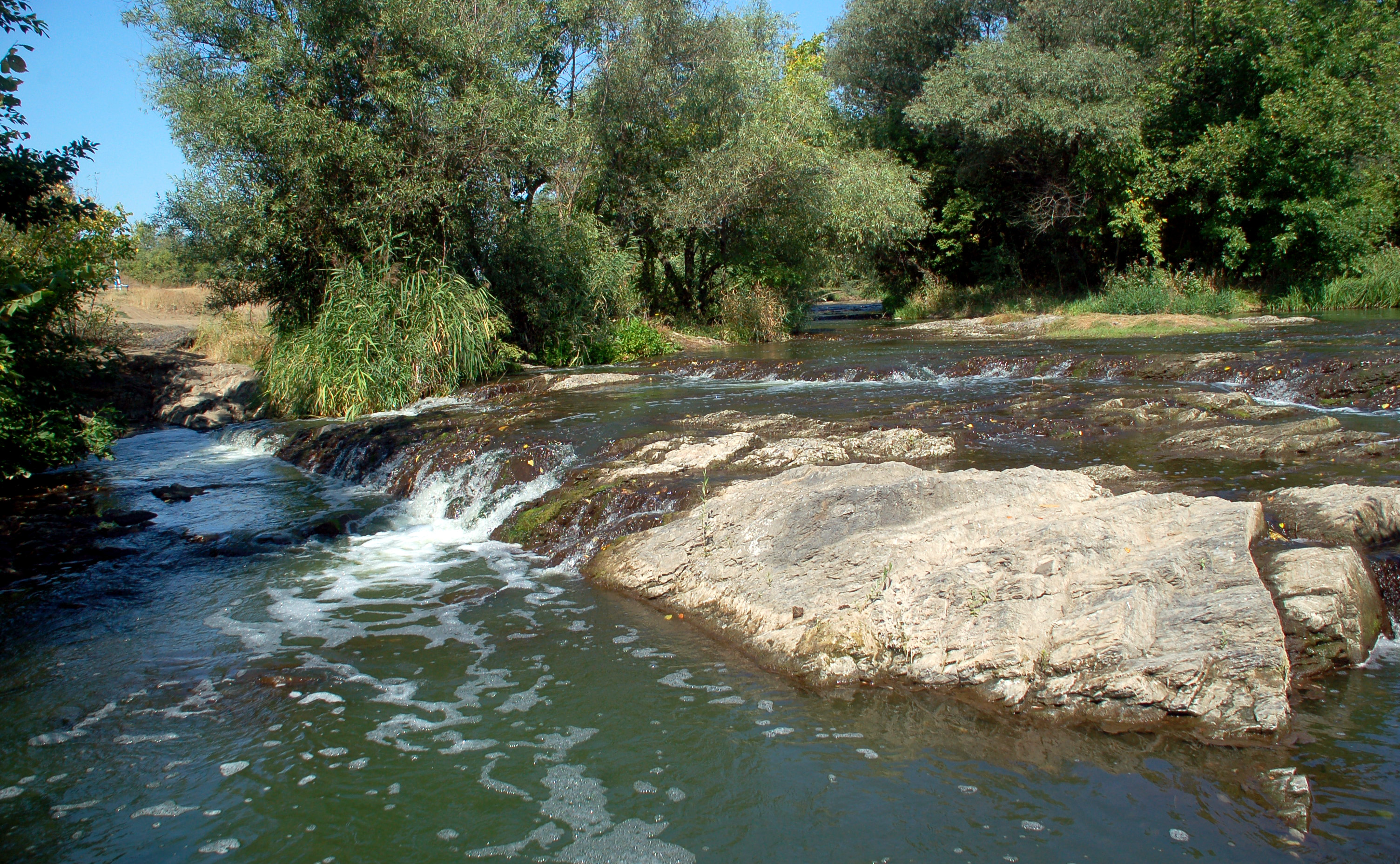 Річка Кринка у ландшафтному парку "Донеций Кряж", Донецька область, Україна.